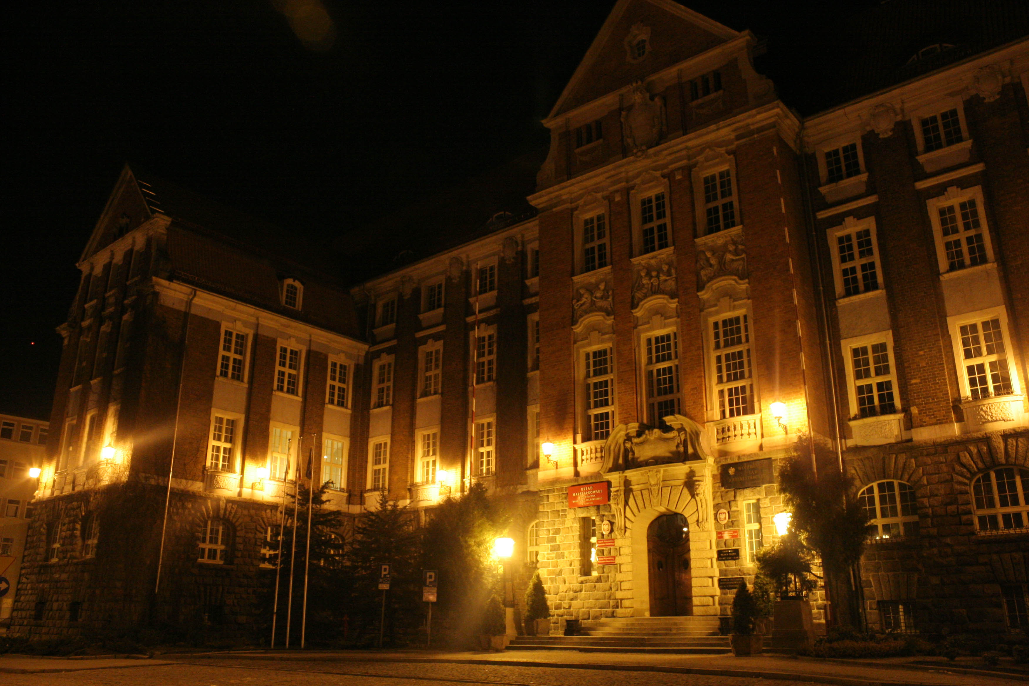 Olsztyn, ul. Emilii Plater 1 - dawna siedziba rejencji, po 1945 dyrekcja rejonowa PKP, obecnie siedziba Urzędu Marszałkowskiego i Wojewódzkiego Sądu Administracyjnego w Olsztynie (zabytek nr A-2441 z d. 30.08.1988)